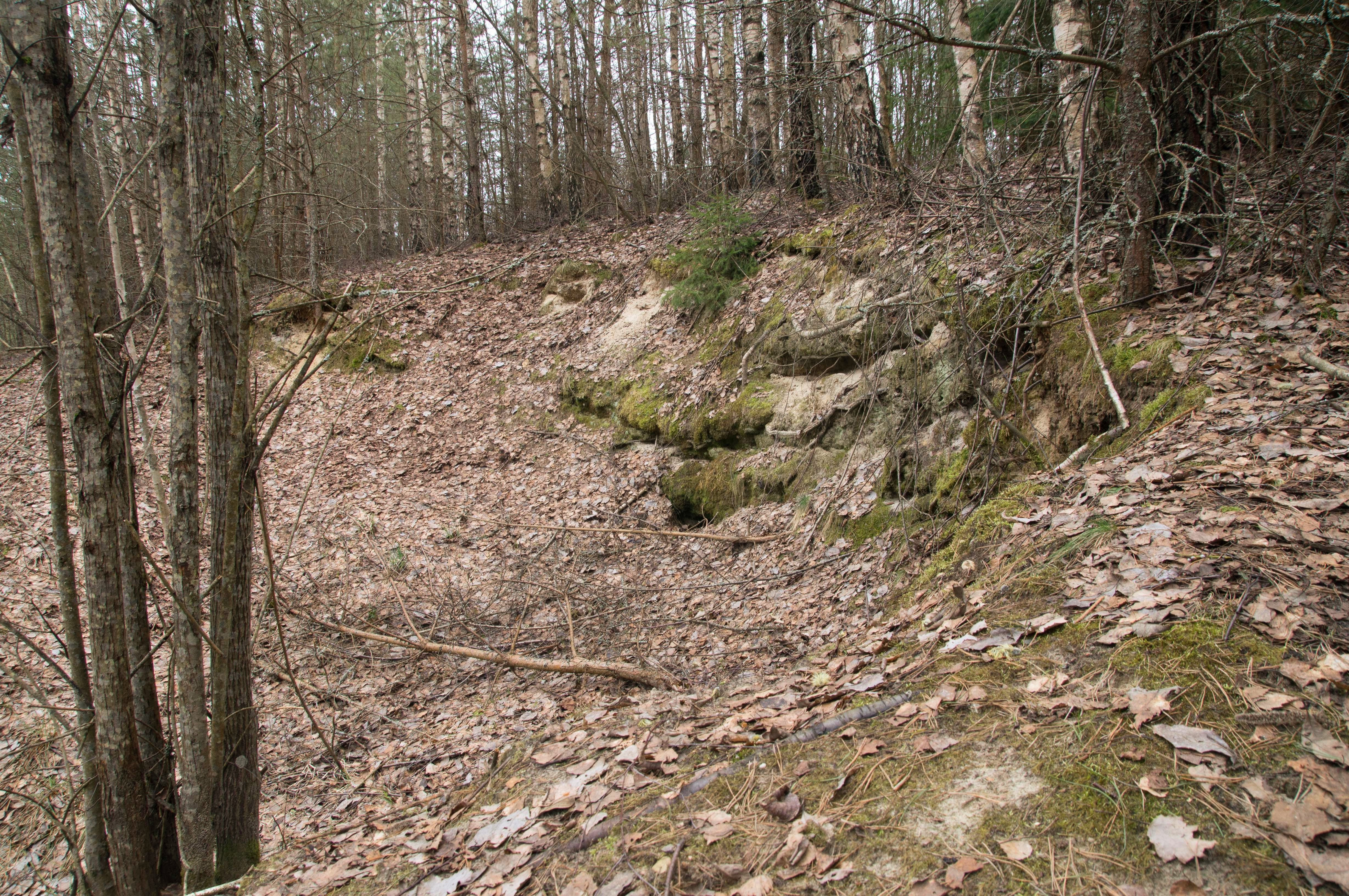 Агаленне Вінцантова